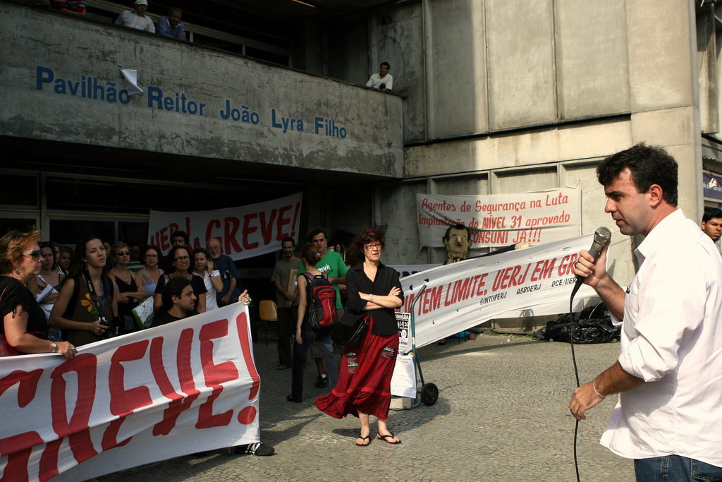 Universidade do Estado do Rio de Janeiro (UERJ)